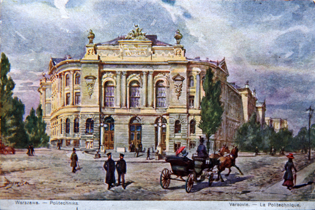 Politechnika Warszawska - Gmach Główny